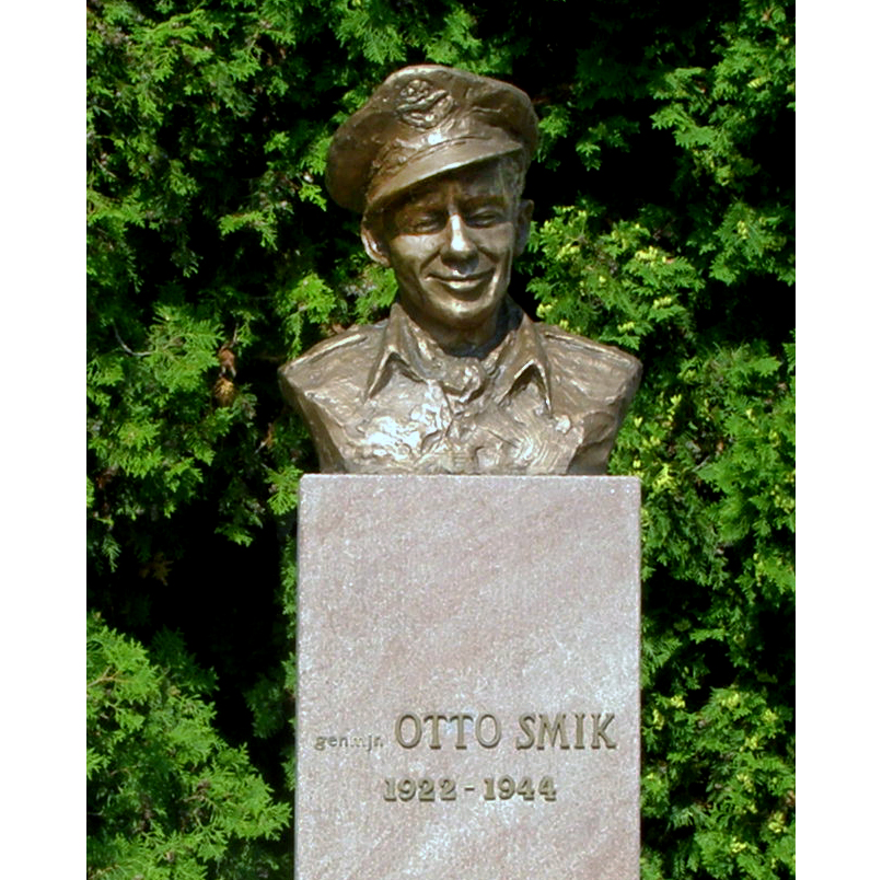 Bronzová busta generál majora Otta Smika